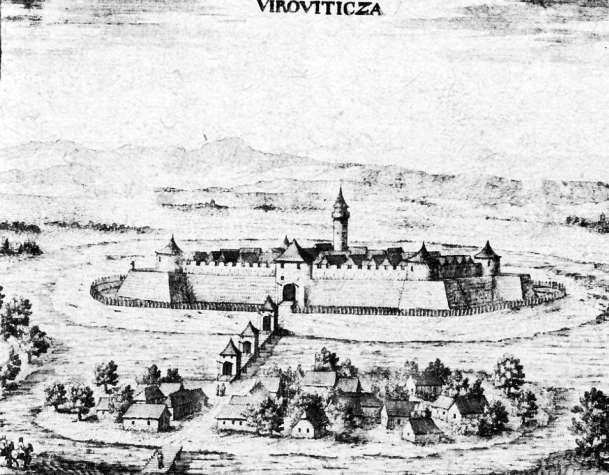 Bakrorezna panorama Virovitice, Pavla R. Vitezovića objavljena 1689. godine u Valvazorovu djelu "Die Ehre des Herzogthums Craina".